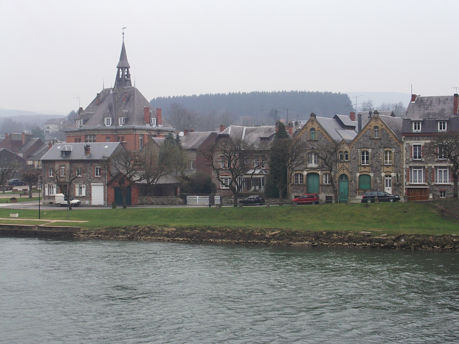 Vue de Haybes